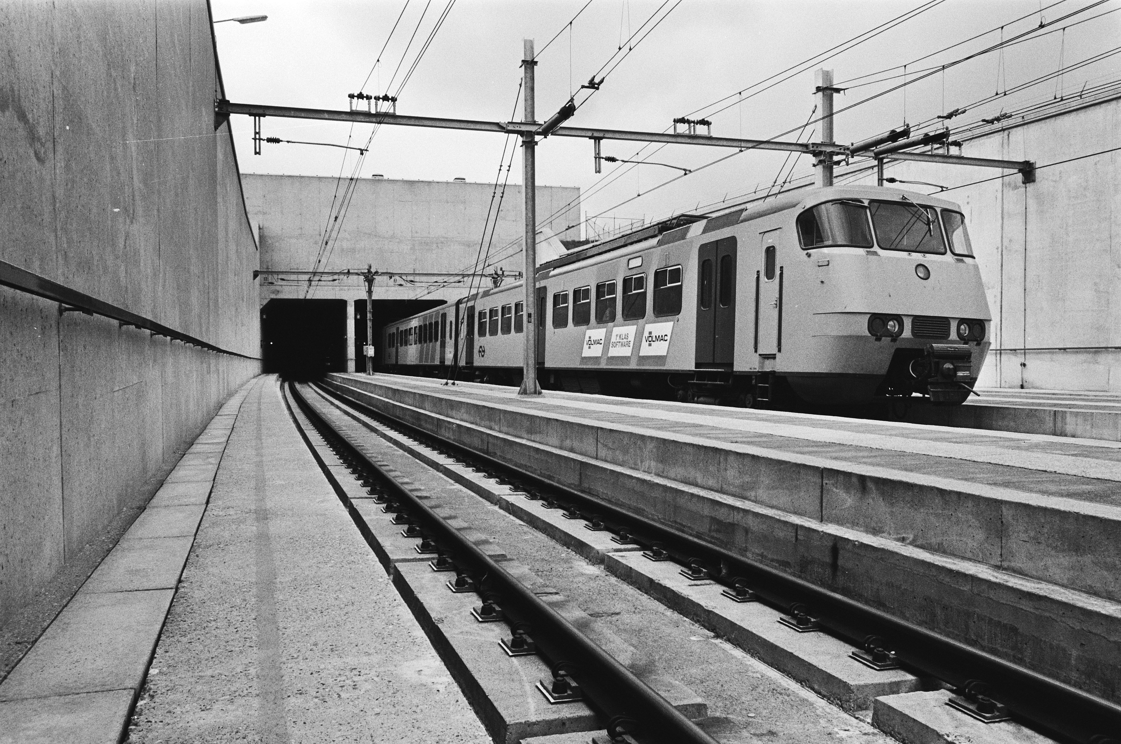 Collectie / Archief : Fotocollectie Anefo Reportage / Serie : Persbezichtiging van de nieuwe spoorlijn door de Hemspoortunnel Beschrijving : Trein komt uit de tunnel Datum : 11 mei 1983 Locatie : Noord-Holland Trefwoorden : treinen, tunnels Fotograaf : Croes, Rob C. / Anefo Auteursrechthebbende : Nationaal Archief Materiaalsoort : Negatief (zwart/wit) Nummer archiefinventaris : bekijk toegang 2.24.01.05 Bestanddeelnummer : 932-5869